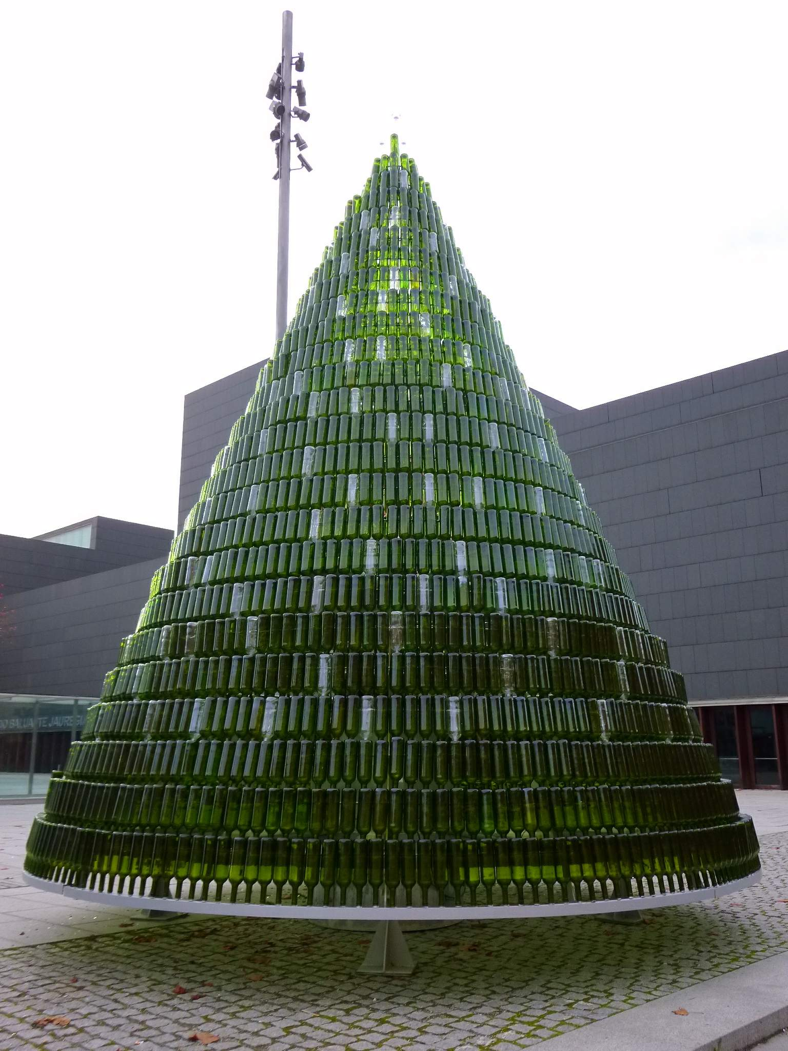 Árbol de Navidad hecho con botellas de vino junto al Palacio de Congresos y Exposiciones de Navarra (Baluarte), en Pamplona (diciembre 2013)